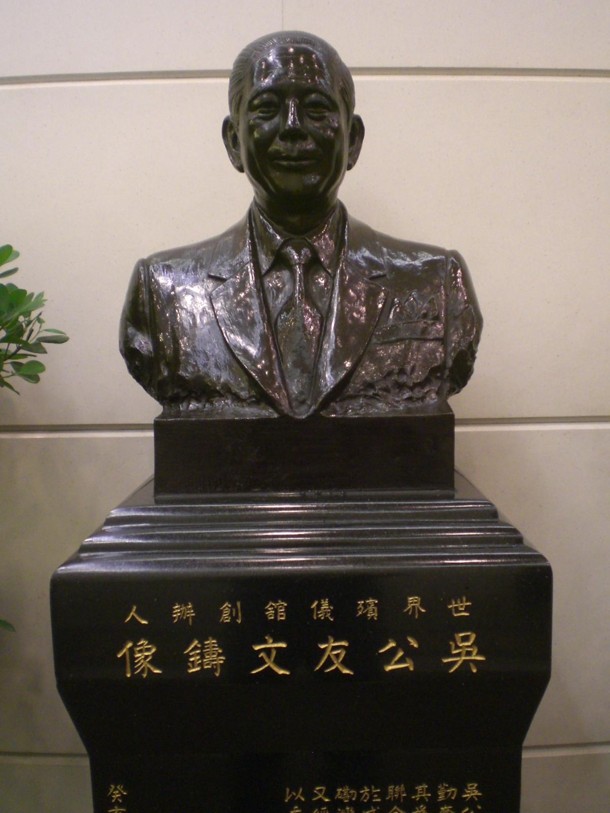 中文（香港）: 世界殯儀舘創辦人之一吳友文